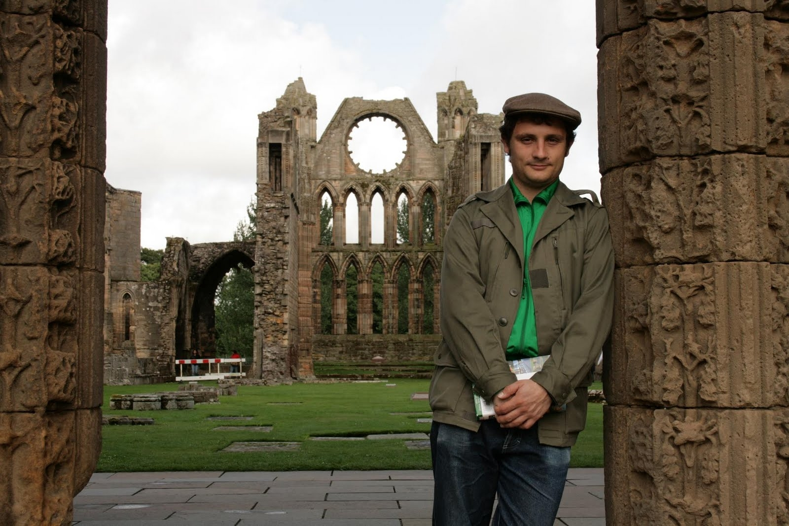 Vilar-Bou en Escocia